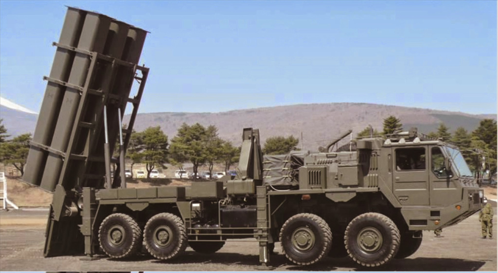 １２式地対艦誘導弾